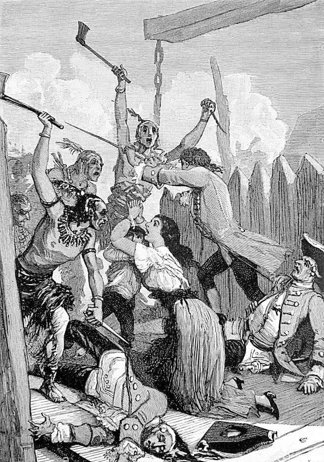 Natchez Indians massacre at fort-Rosalie